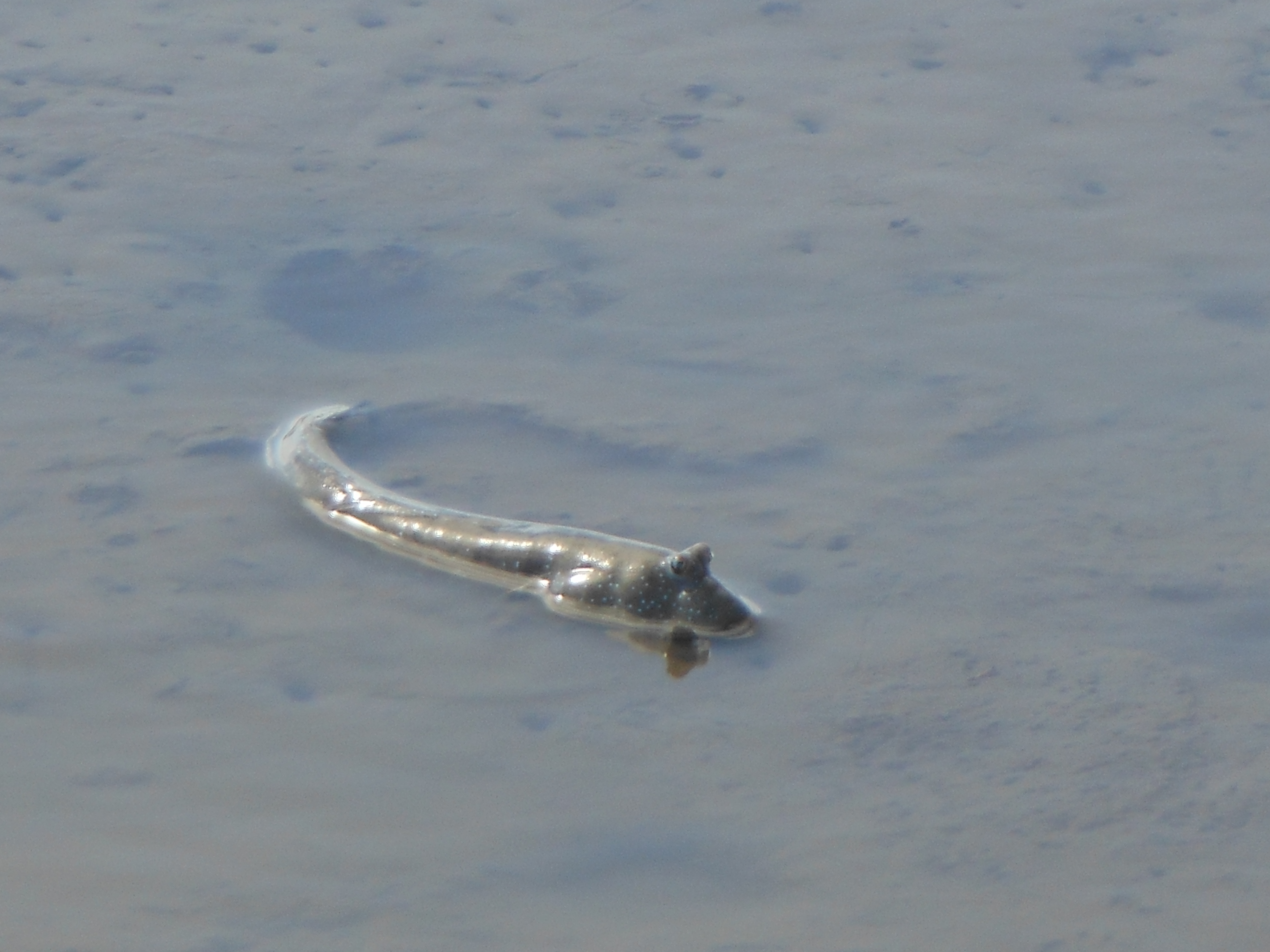 海面から顔を出すムツゴロウ、佐賀市の東与賀海岸の干潟にて。